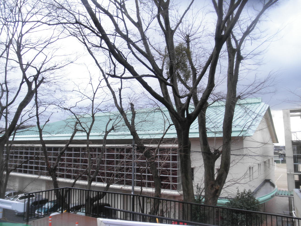 井手町立泉ヶ丘中学校